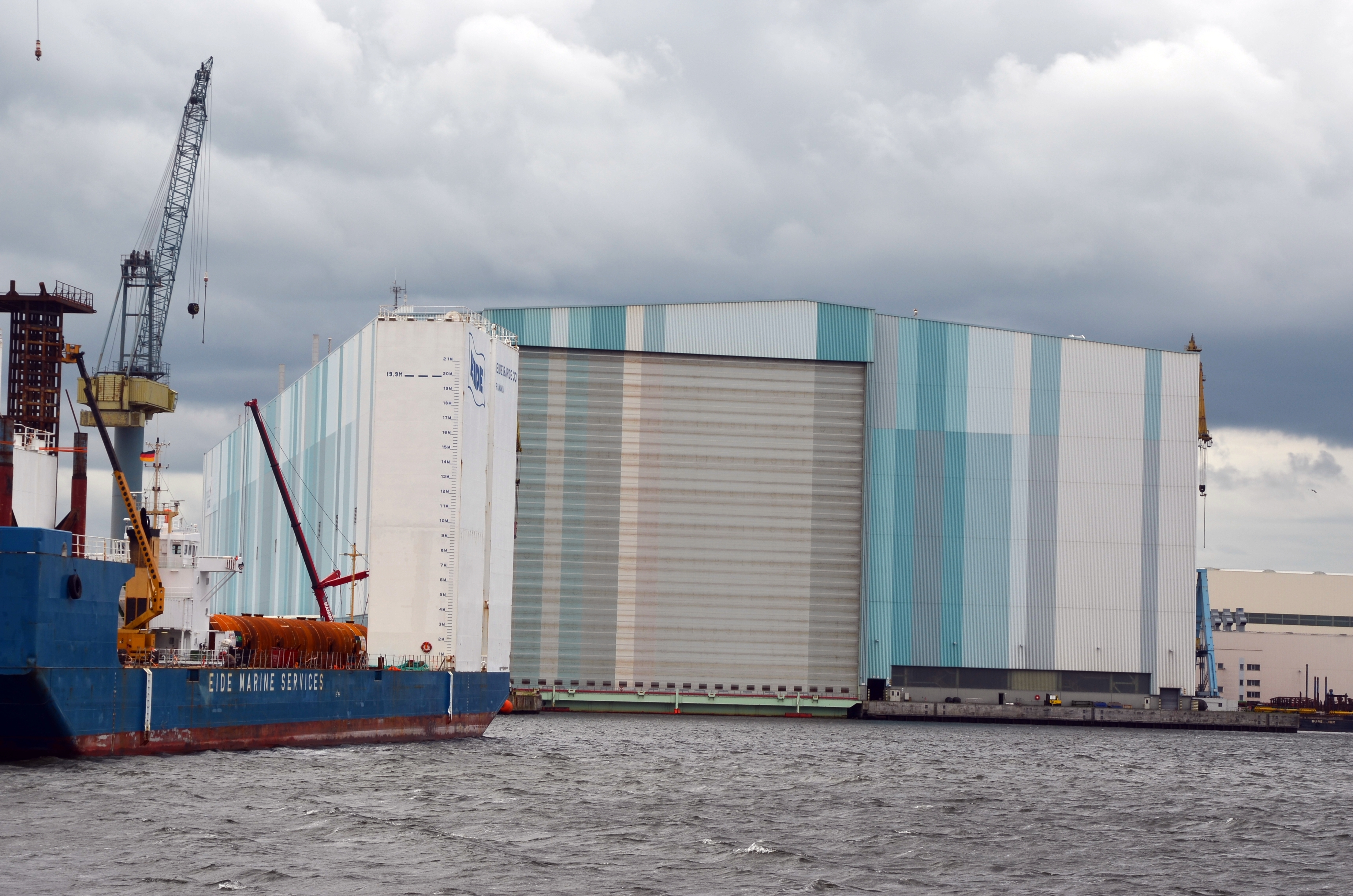 Der Hafen in Wismar